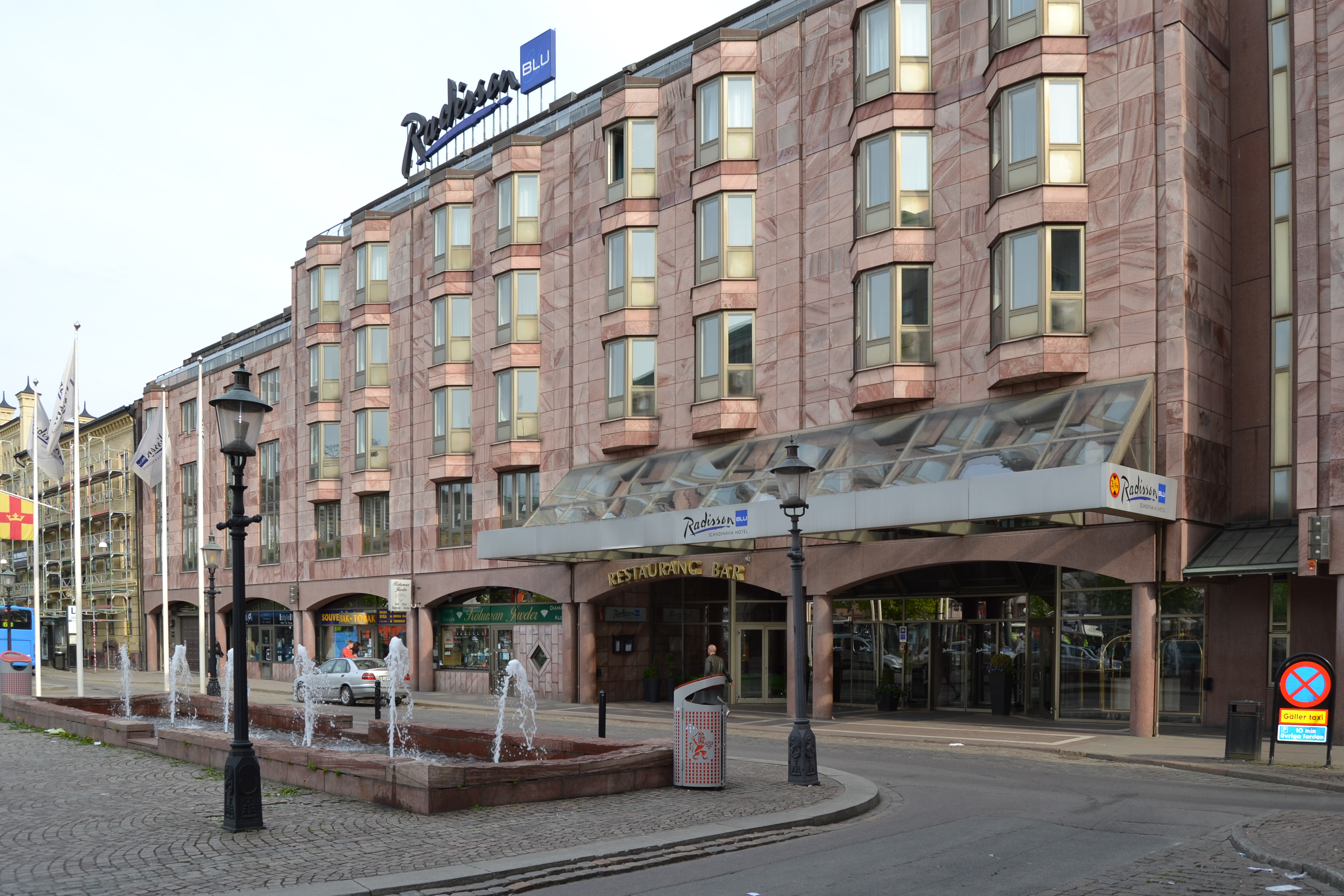 Radisson Blu vid Södra Hamngatan 59 i Göteborg.